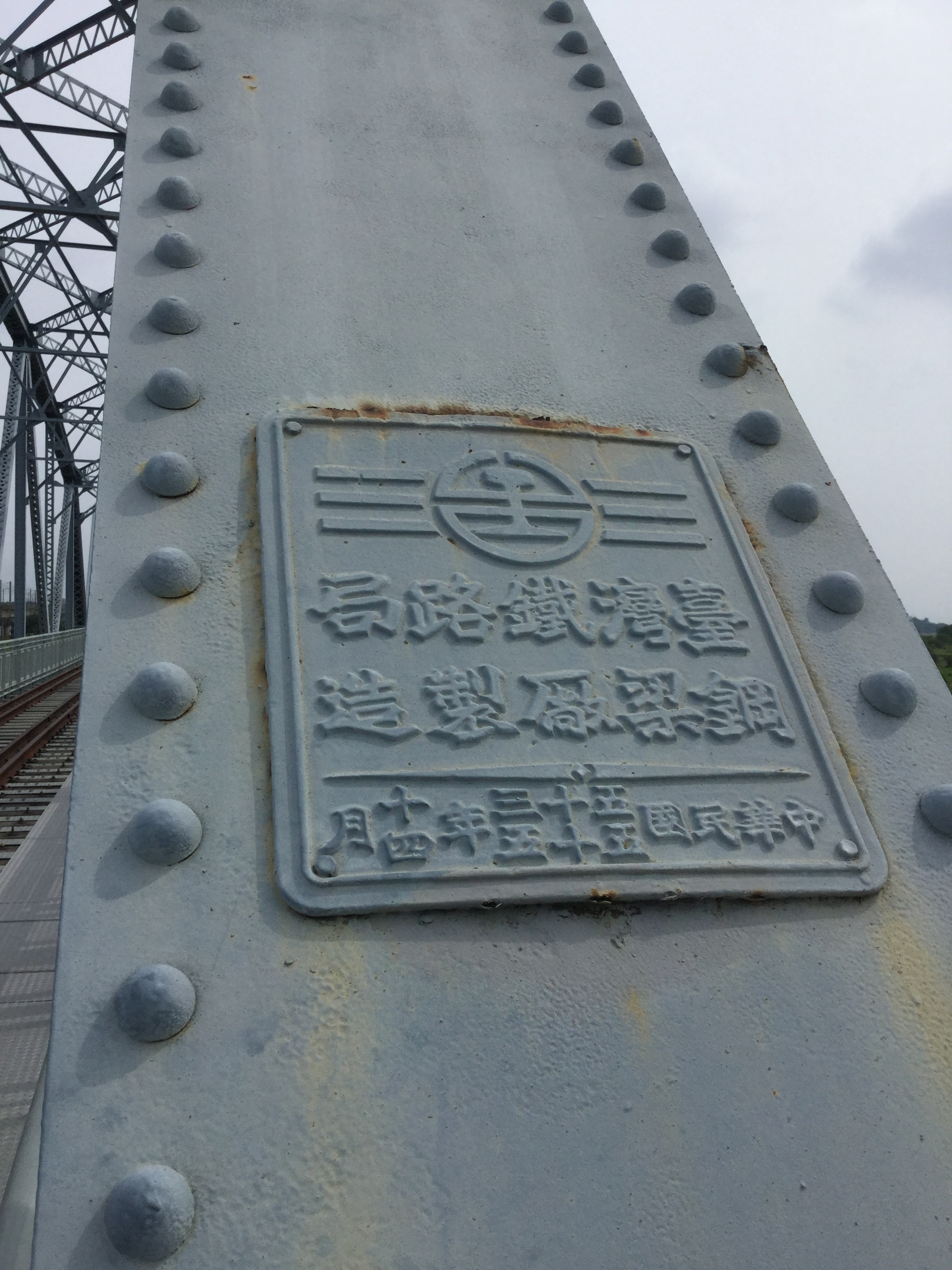 高屏溪舊鐵橋銘板